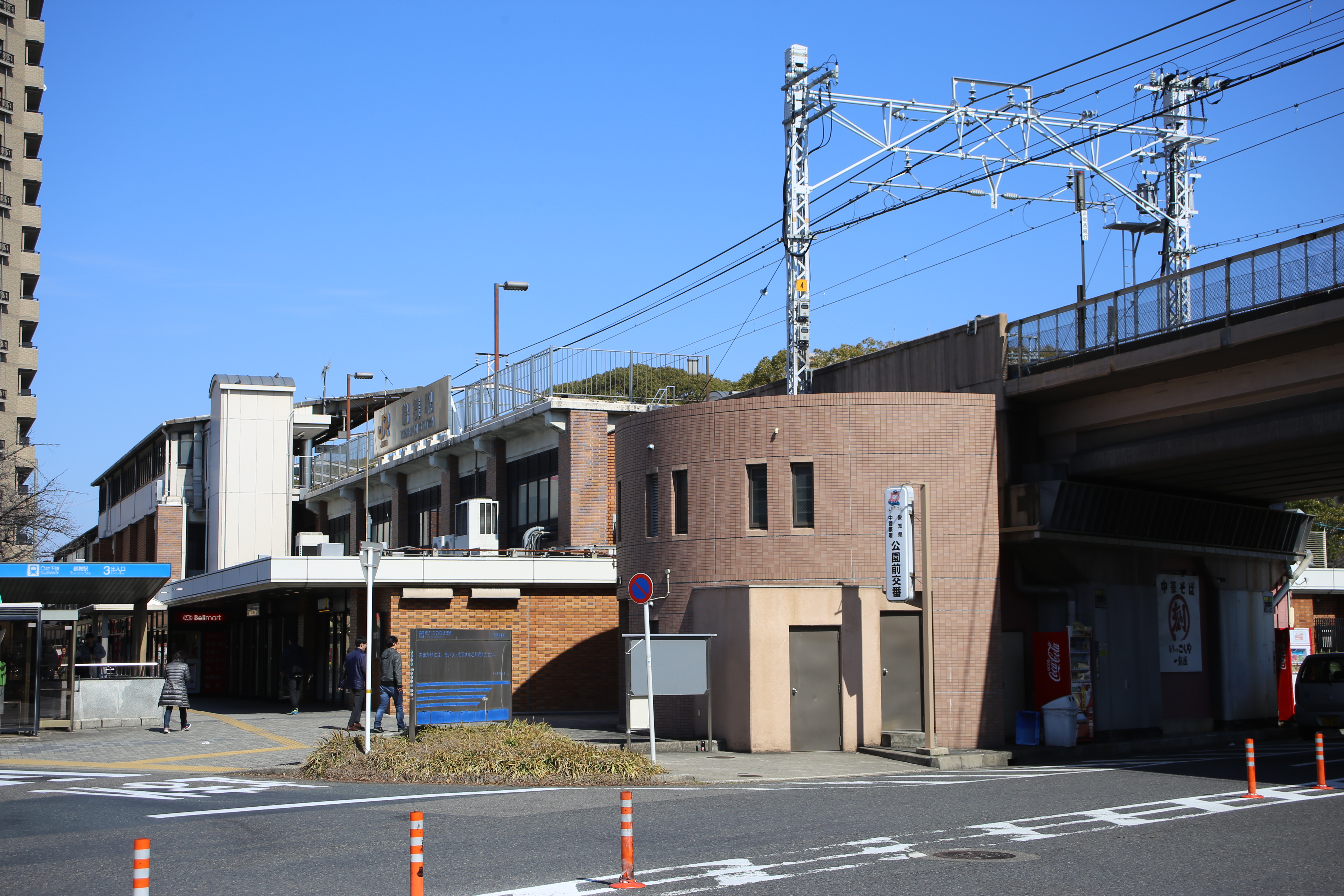 名古屋市中区千代田のJR中央本線鶴舞駅